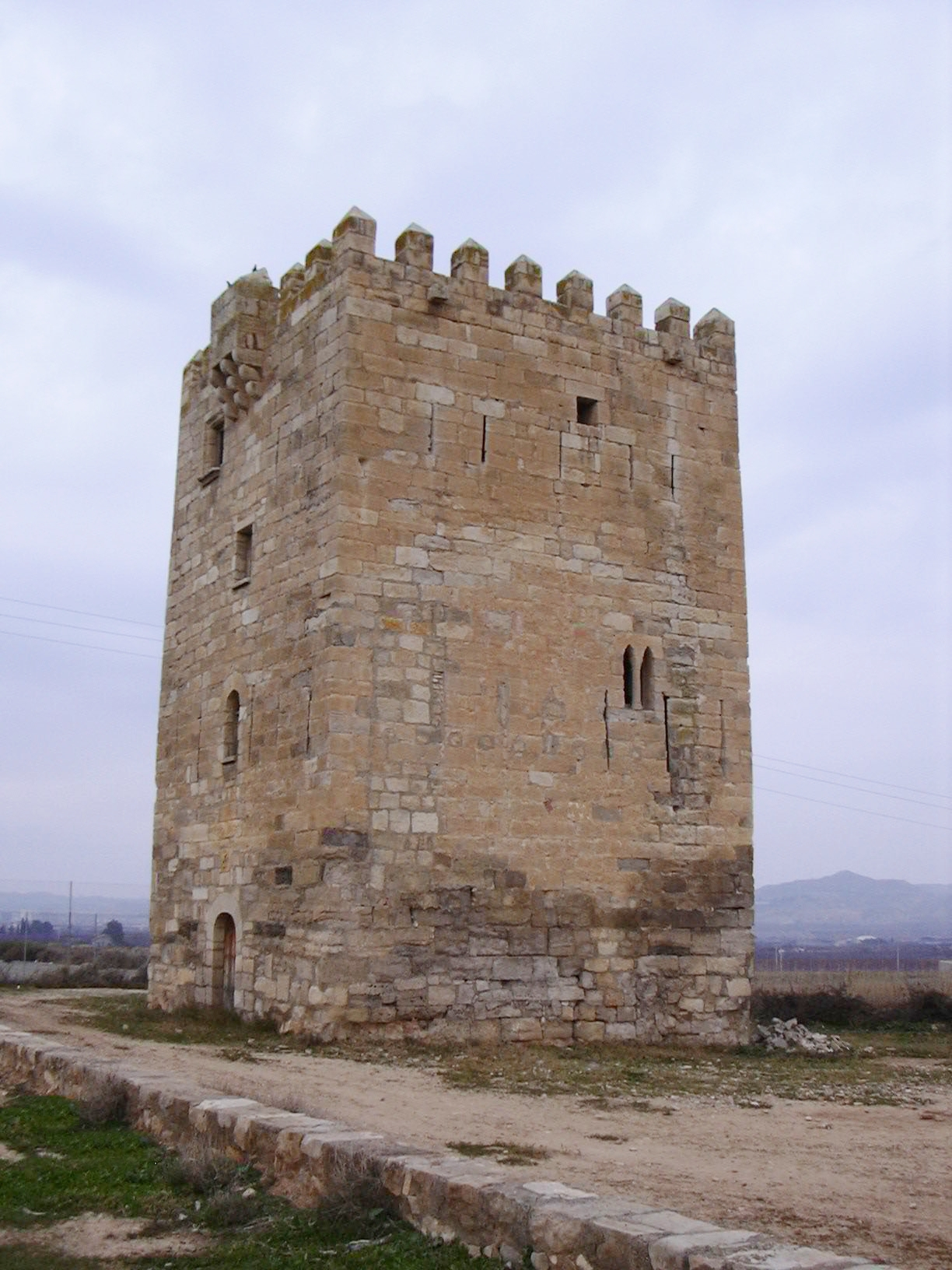 Torre dels Frares, abans l'Almúnia dels Templers, a Fraga.